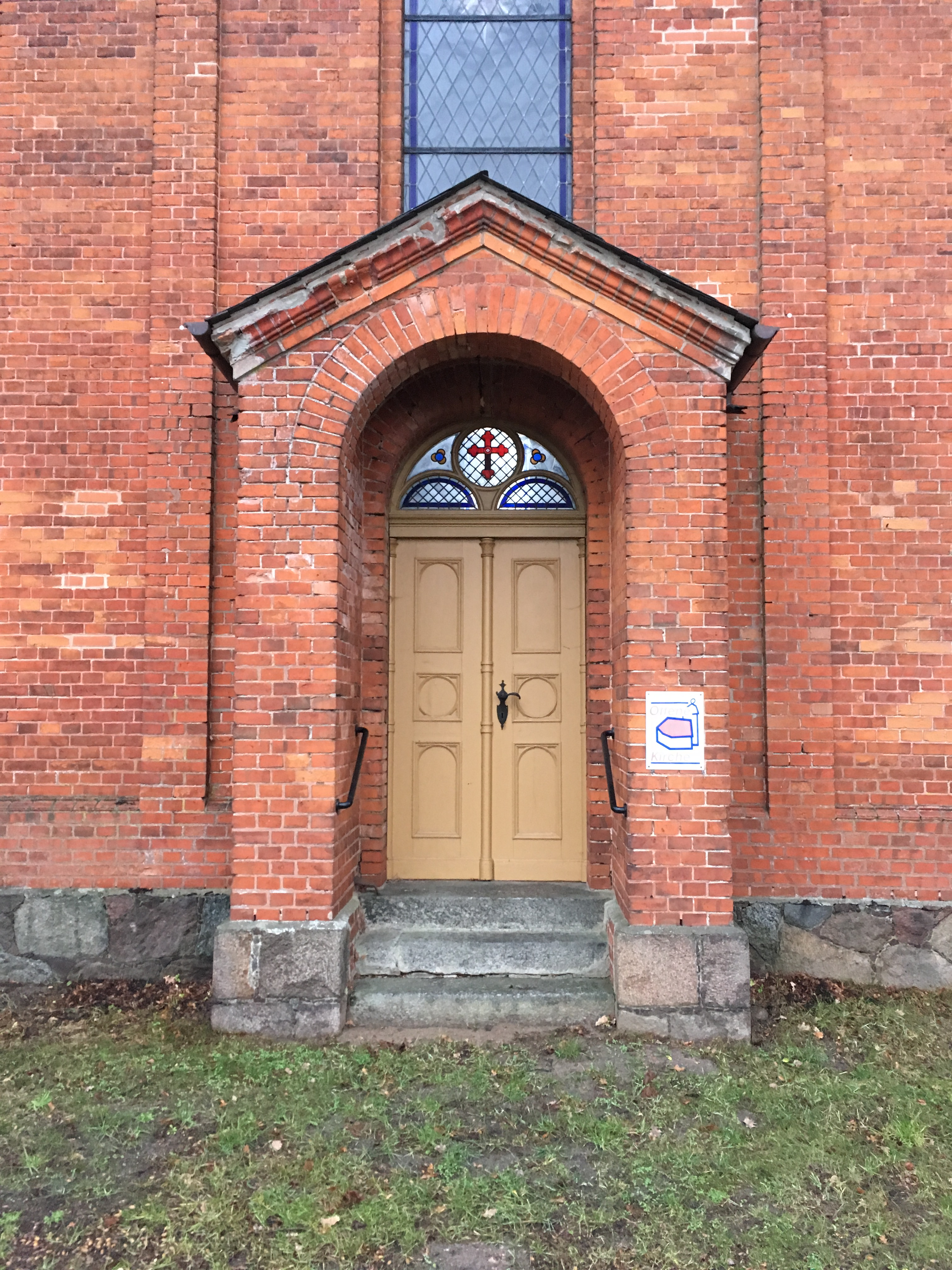 Die Dorfkirche Dranse der Stadt Wittstock/Dosse wurde im Jahr 1861 im Rundbogenstil errichtet. Im Innern steht unter anderem eine Anna selbdritt aus dem Ende des 15. Jahrhunderts.